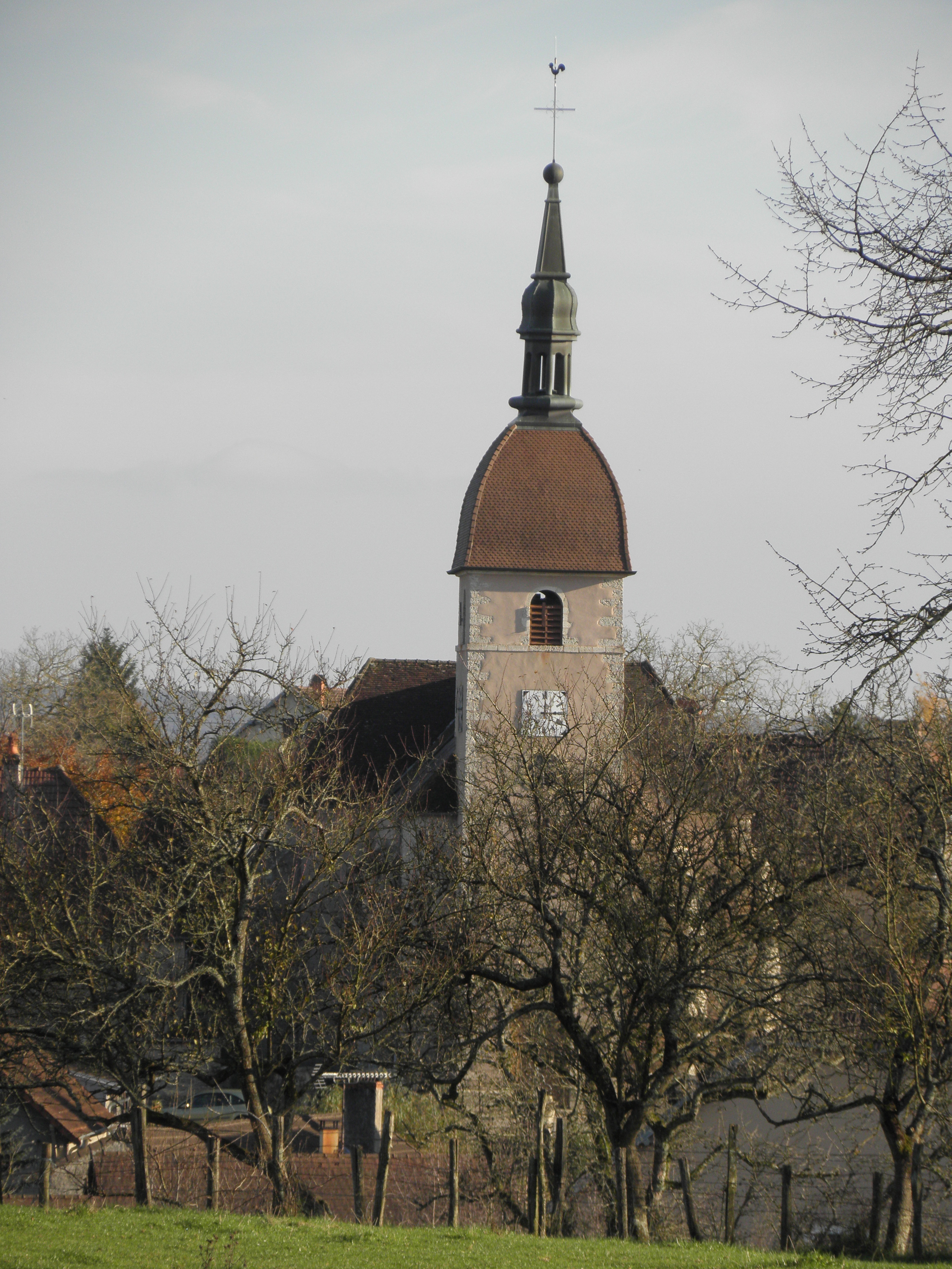 CRESANCEY l'église